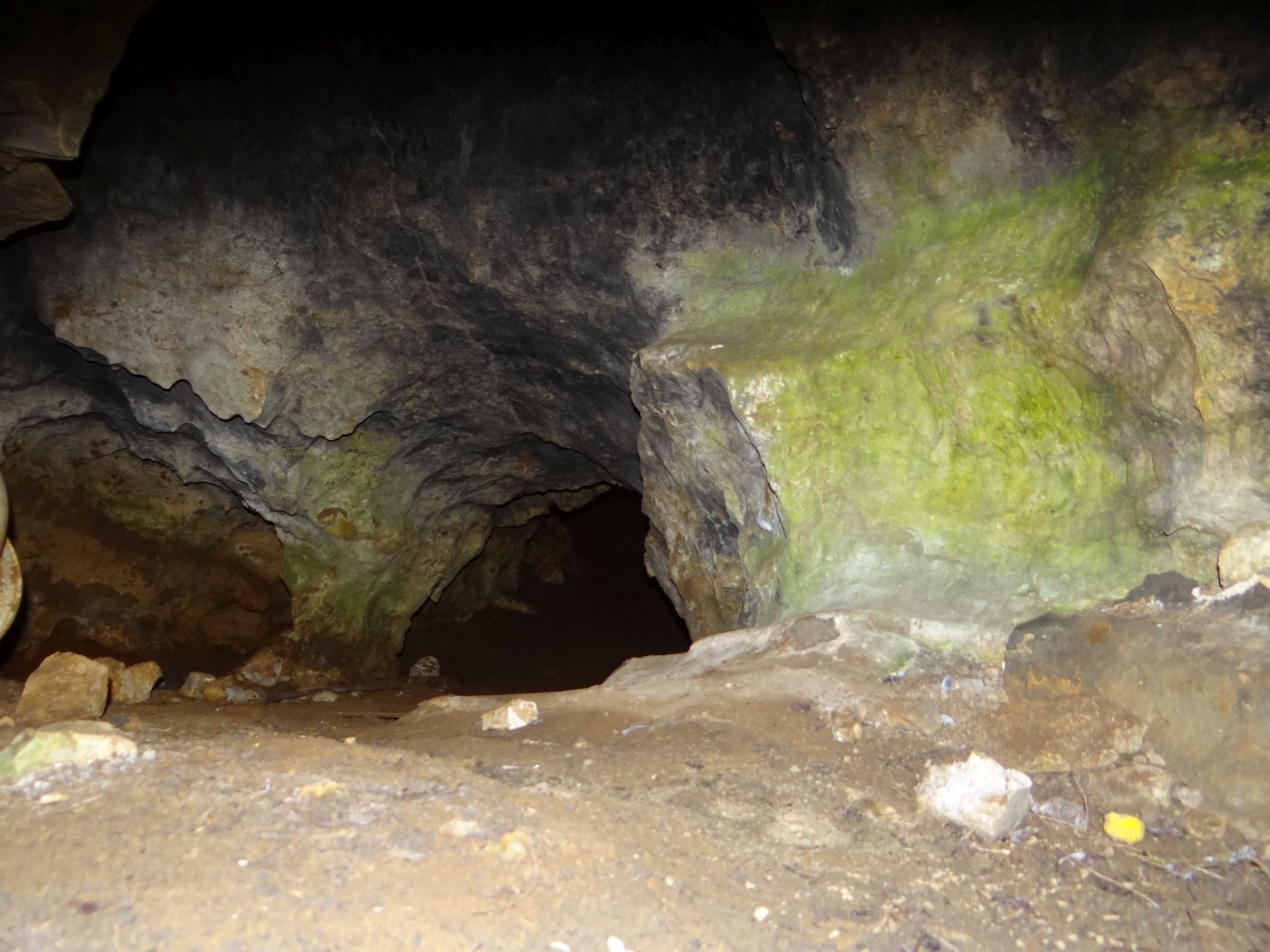 Łom Bergera na Księżej Górze w Pychowicach (Kraków)